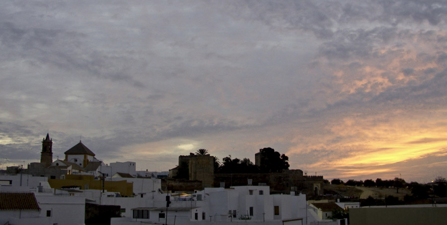 Panorámica con vistas de la Iglesia y el Castillo de Luna Fotografía propiedad de quien la coloca en Wikipedia. Se ceden los derechos de la imagen a Wikipedia por parte del autor (yo mismo).